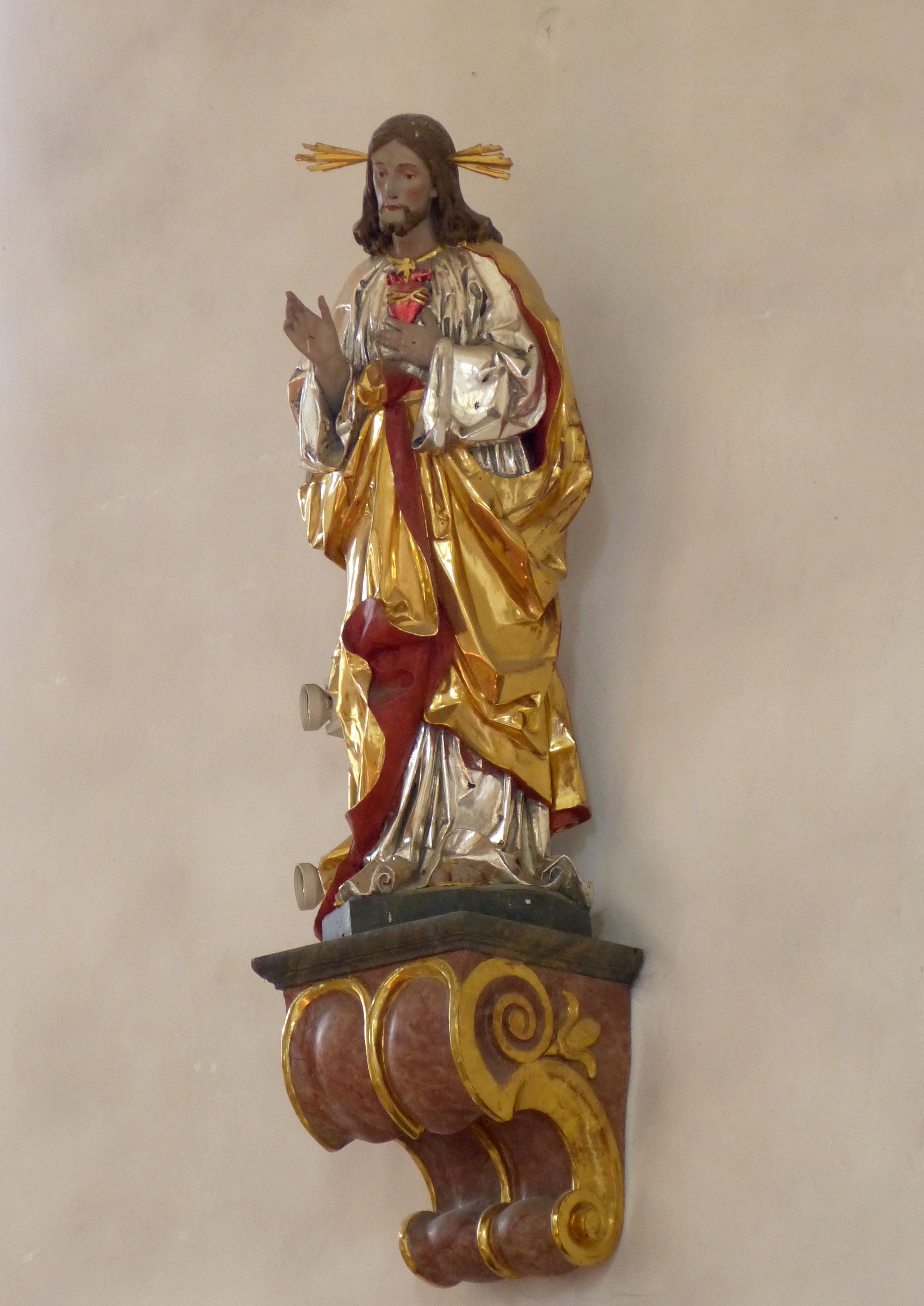 Herz Jesu Figur in St. Afra Betzigau, Landkreis Oberallgäu, Bayern